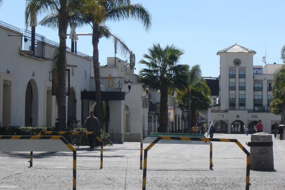 j pani